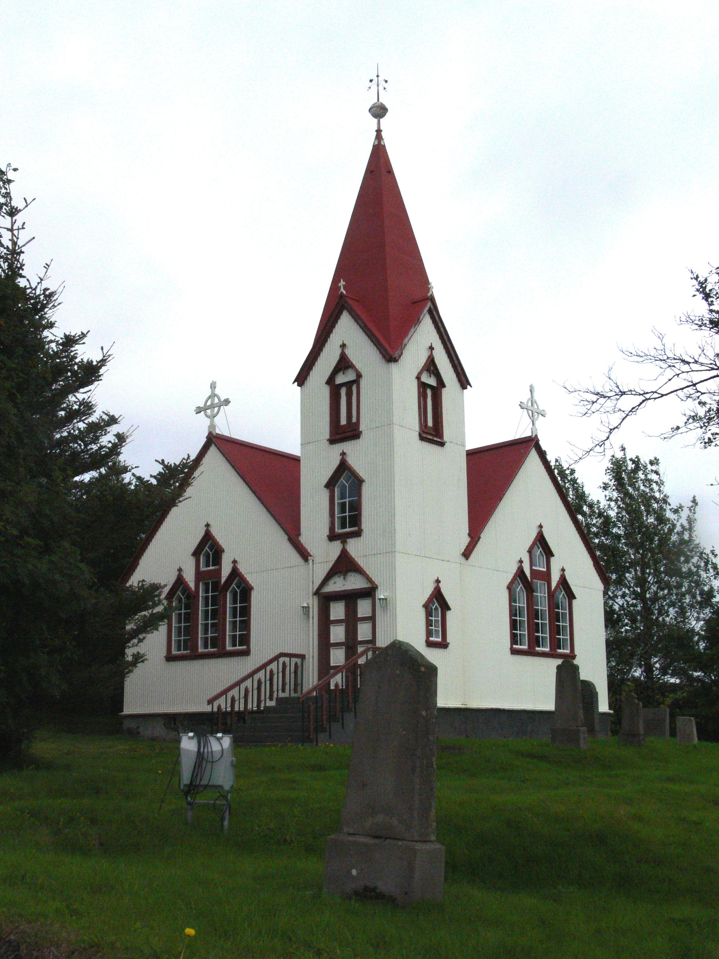 Kirche von Breiðabólstaður in Fljótshlið